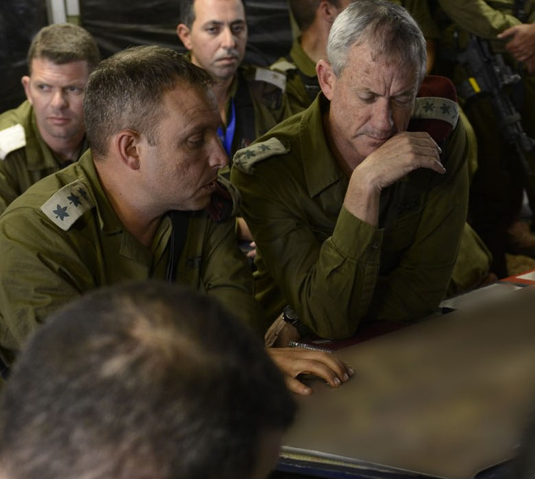 אליעזר טולדנו עם בני גנץ במהלך מבצע שובו אחים